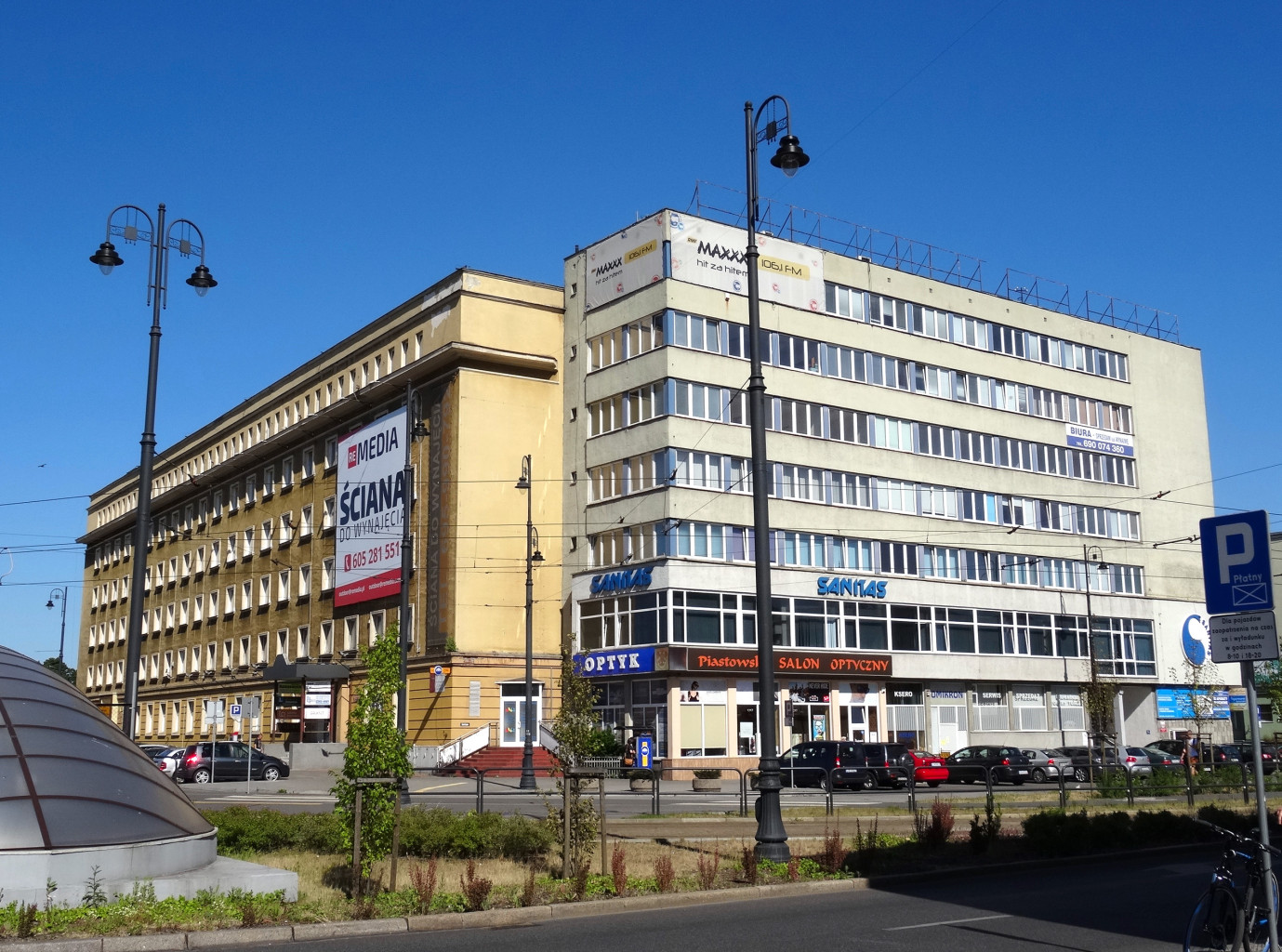 Budynek przed dworcem kolejowym Bydgoszcz Główna, ul. Zygmunta Augusta 14-16, mieści m.in. Starostwo Powiatowe w Bydgoszczy, Kujawsko-Pomorski Wojewódzki Inspektorat Nadzoru Budowlanego, Okręgowy Urząd Probierczy w Warszawie - Wydział Zamiejscowy w Bydgoszczy